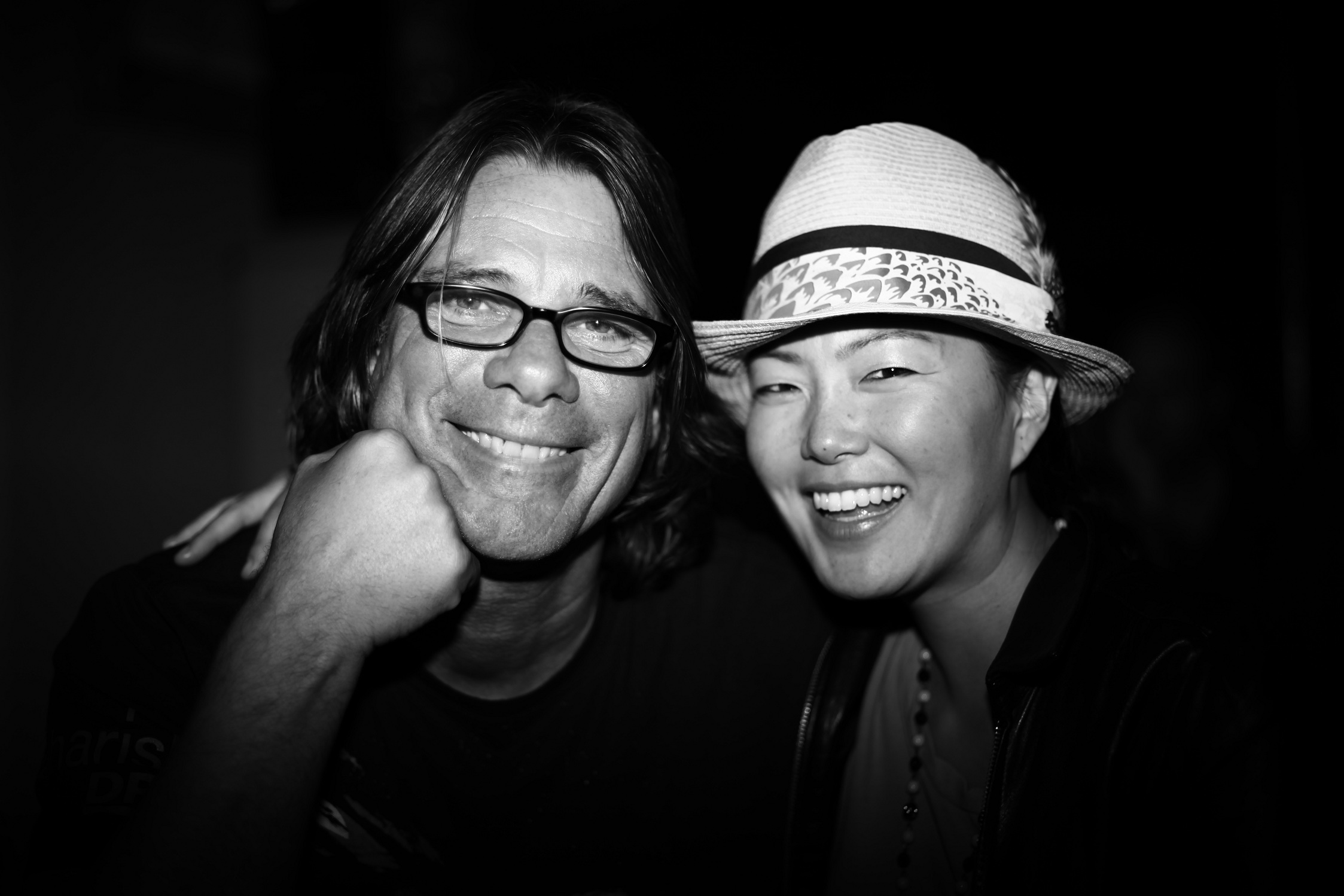 Gunther Mende mit Ehefrau Mee Eun Kim